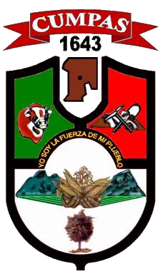 Escudo del municipio sonorense.